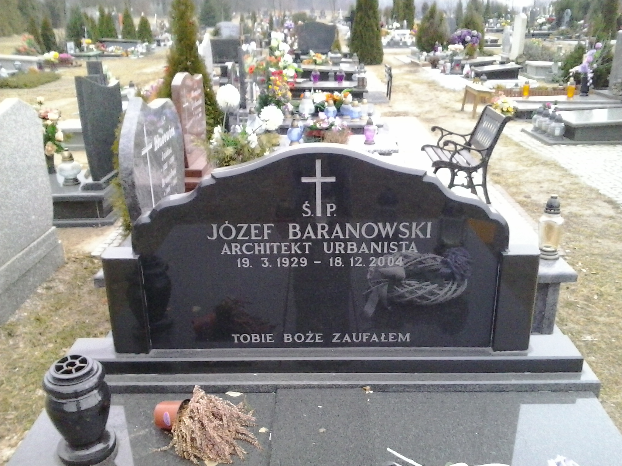 Cmentarz w Suchym Lesie. Grób Józefa Baranowskiego, architekta i urbanisty.